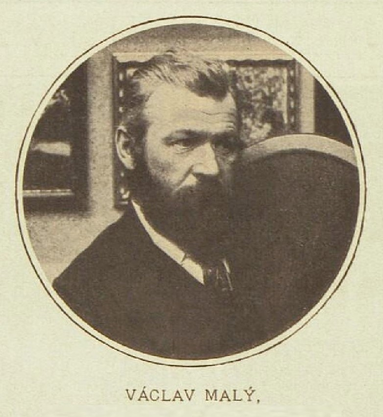 Václav Malý (1874-1935), český malíř a dokumentátor krojů